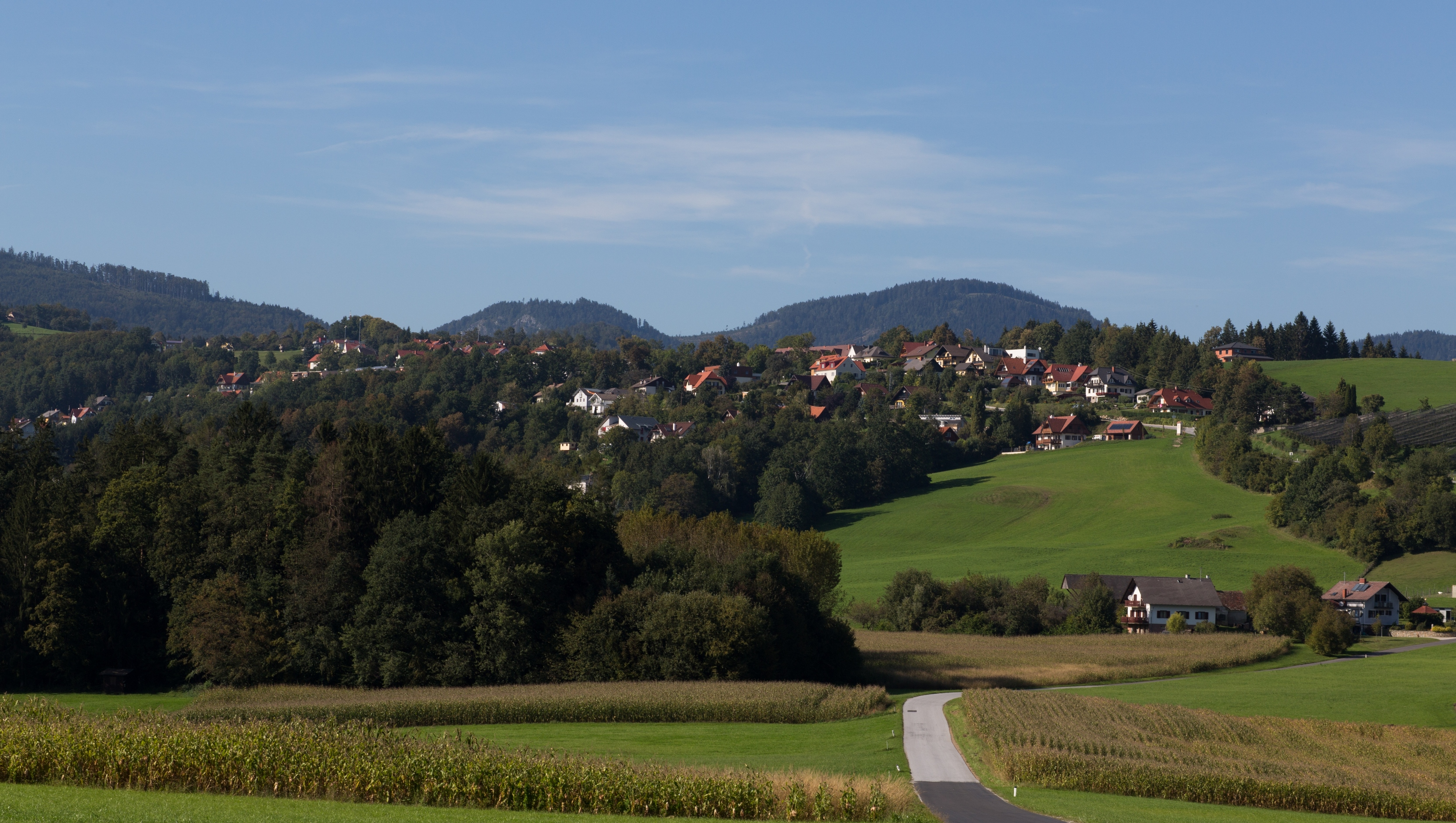 Gutenberg an der Raabklamm, Steiermark, Austria